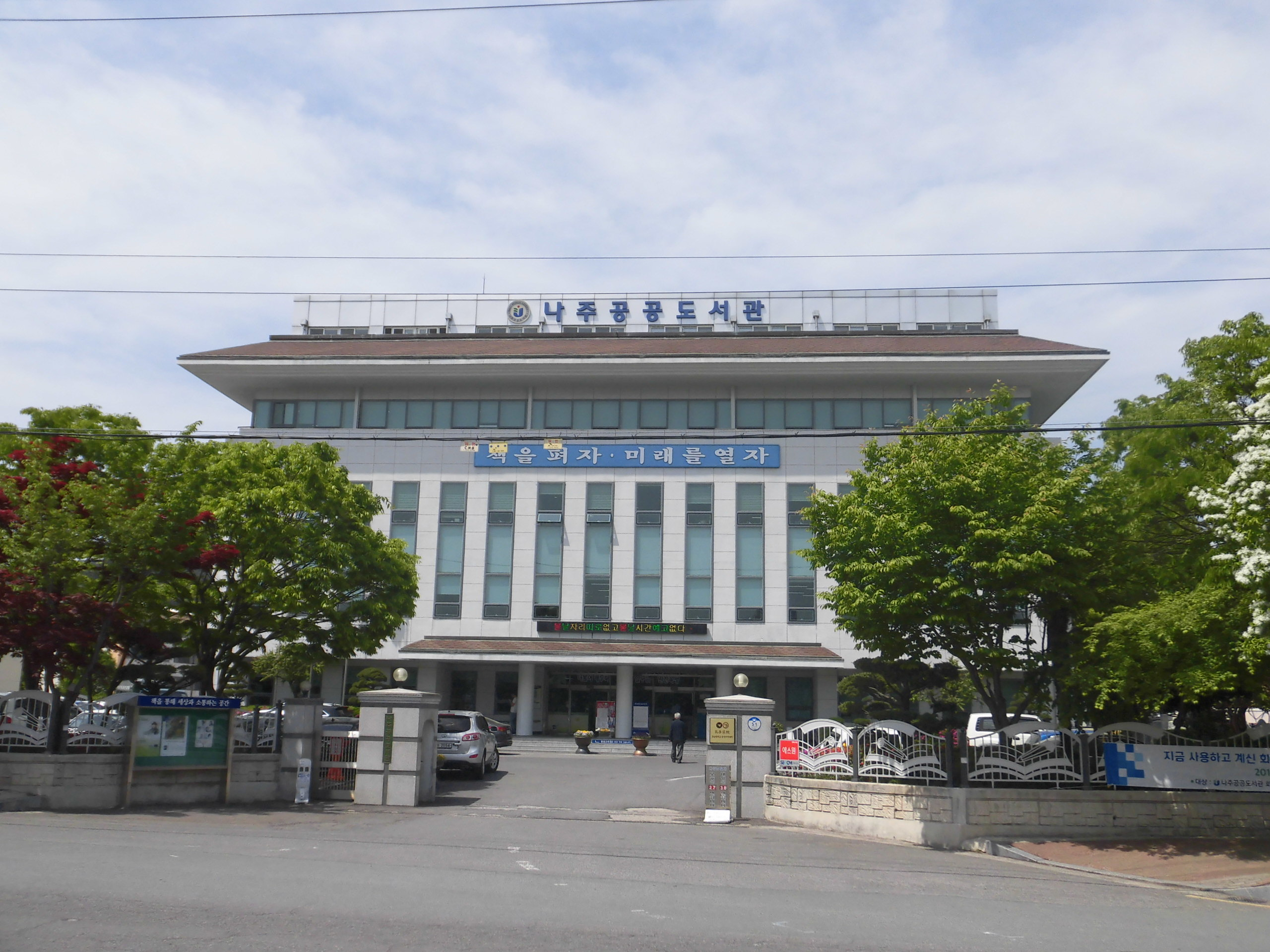 전라남도 나주시에 있는 나주공공도서관